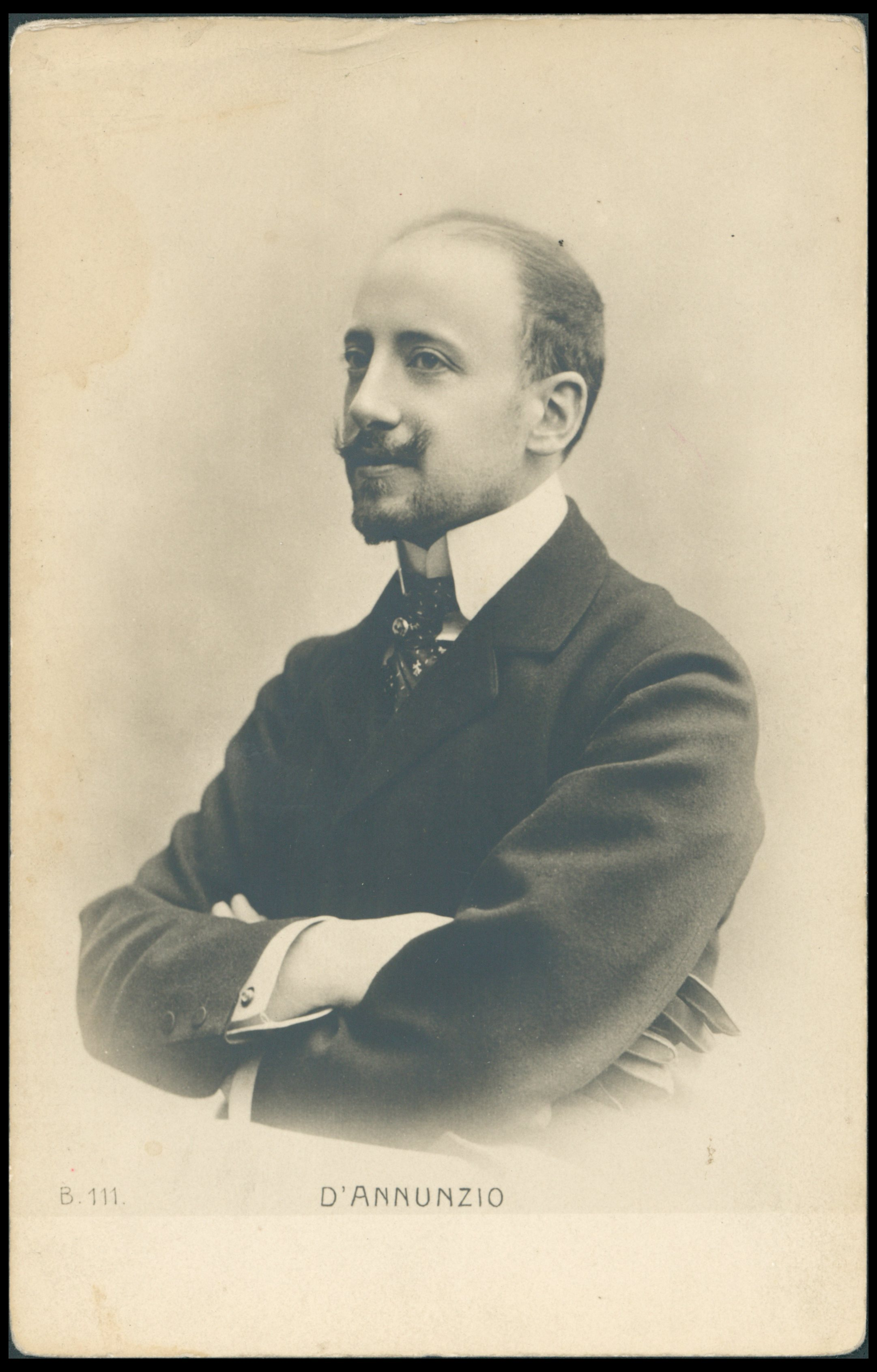 Gabriele d'Annunzio, ante 1914 r.